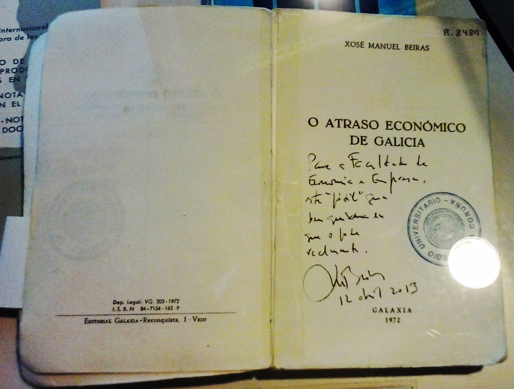 Adicatoria e sinatura de Xosé Manuel Beiras, O Atraso económico de Galiza Facultade de Económicas da Universidade da Coruña